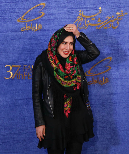 نسیم ادبی در سی و هفتمین دوره جشنواره فیلم فجر